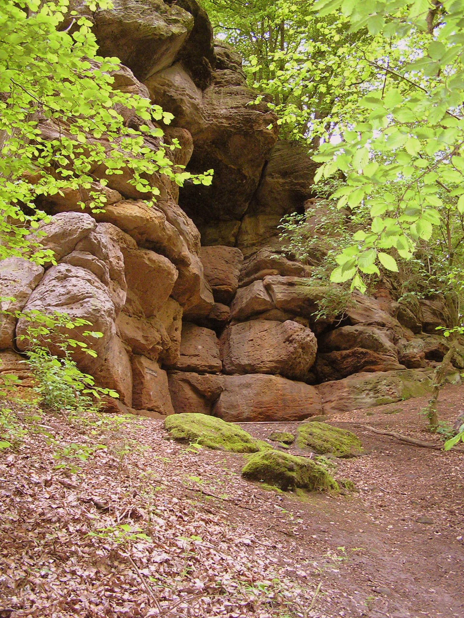 Blick zur Hollenkammer in Lütersheim